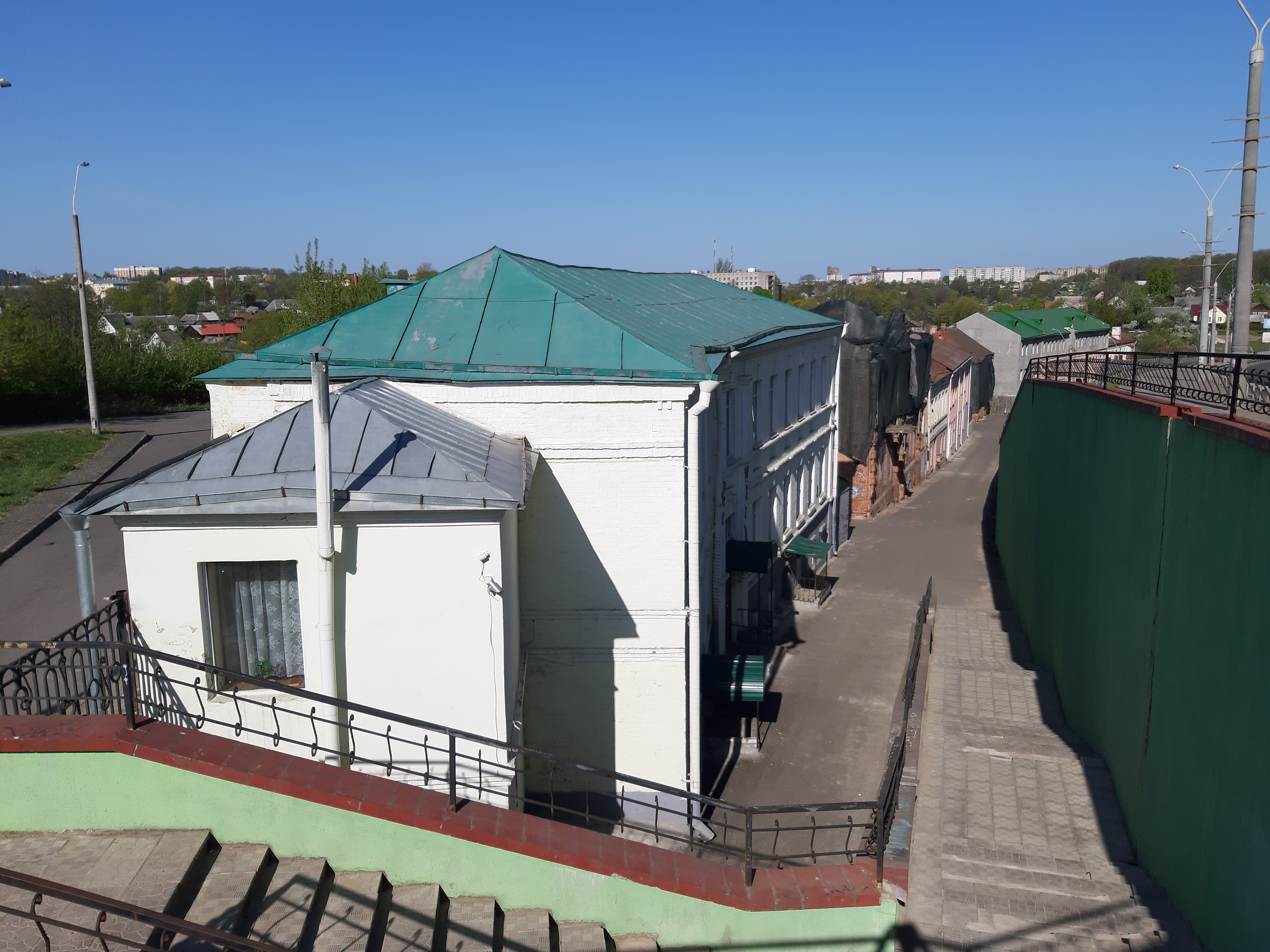 Магілёў. Па Лазарэнкі